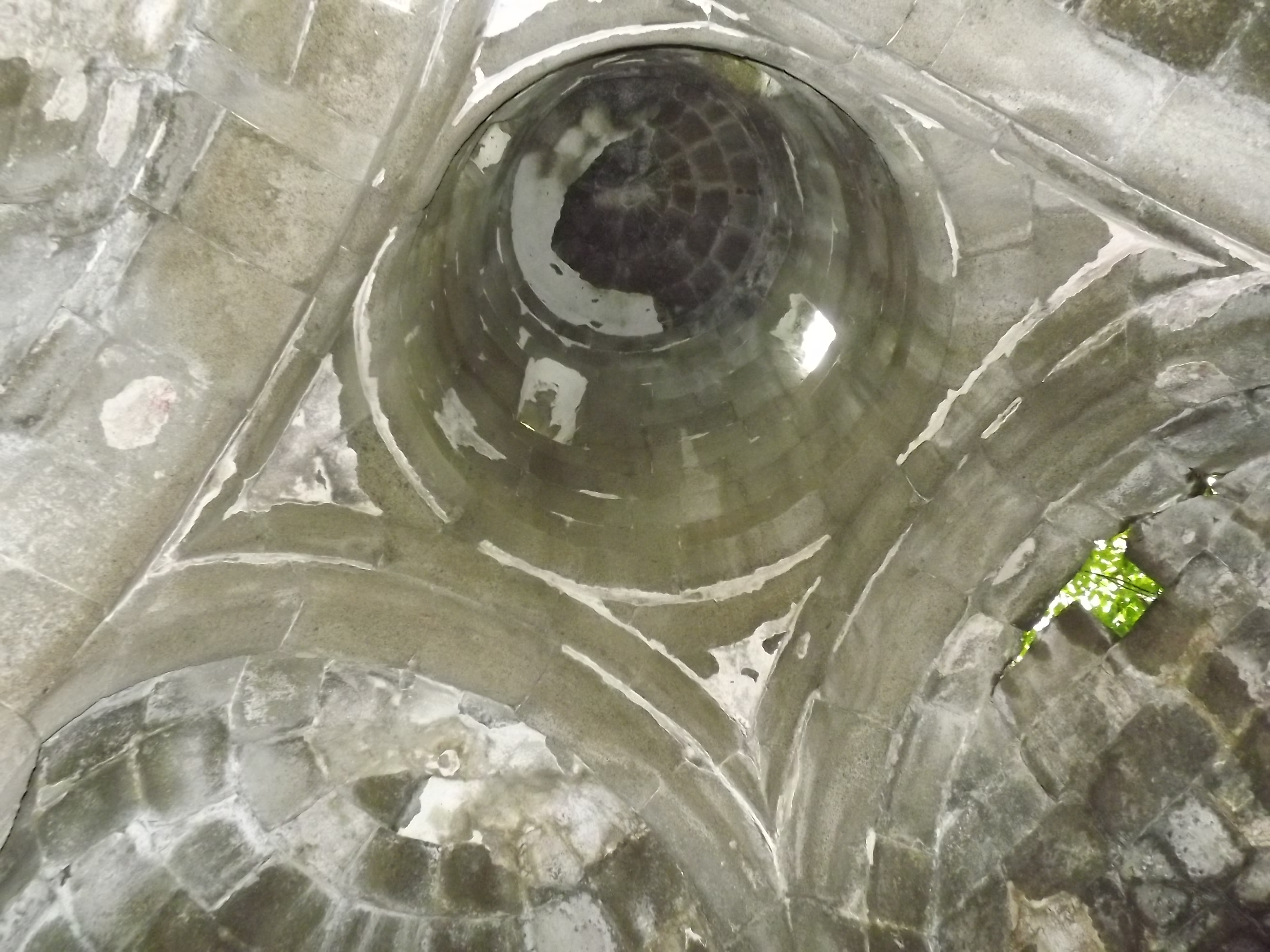 Վանական Համալիր «Սամսոն» 8/16